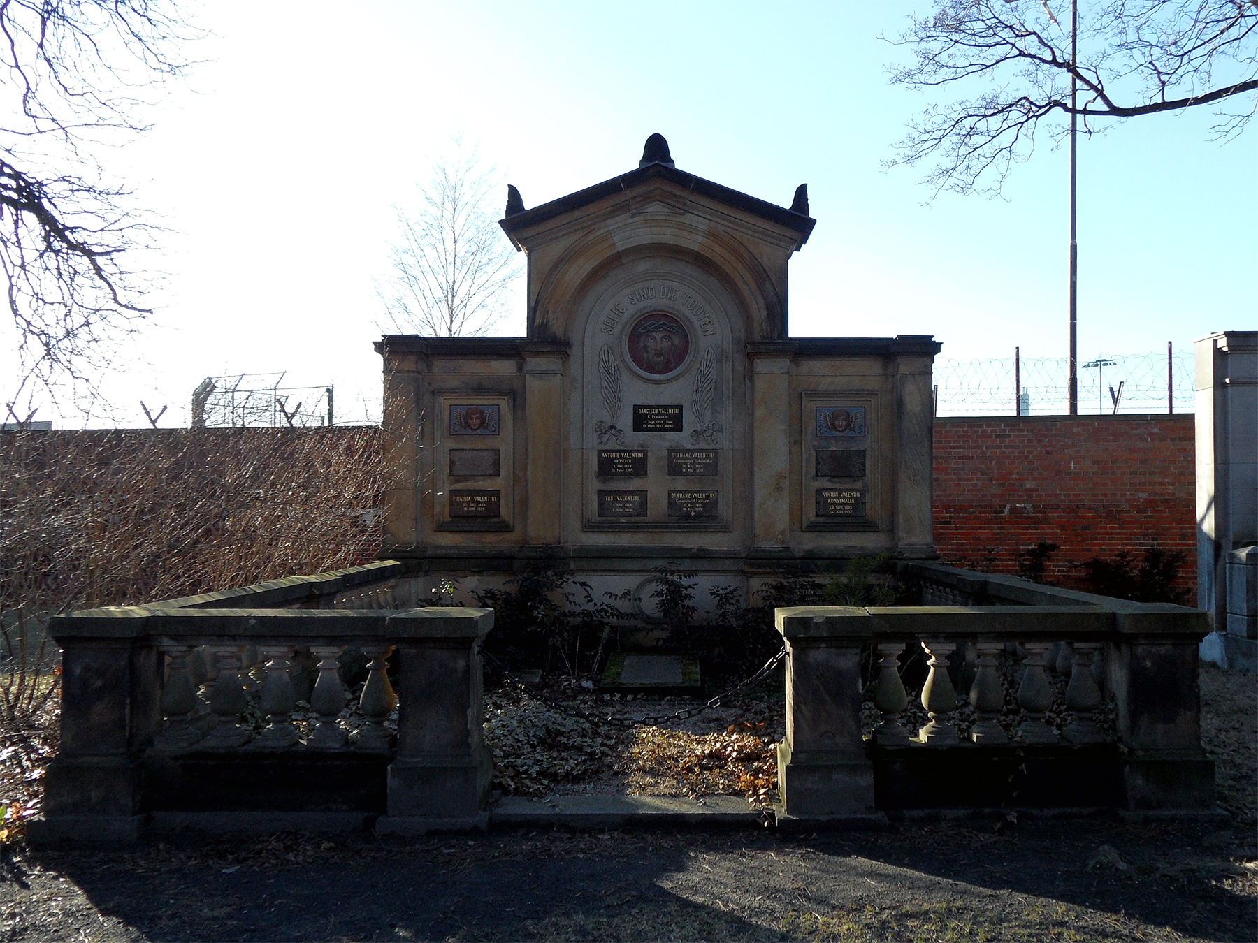 Grabmal Valentini Friedhof Columbiadamm, Berlin-Neukölln Grabmal Valentini, wiederhergestellt 1997